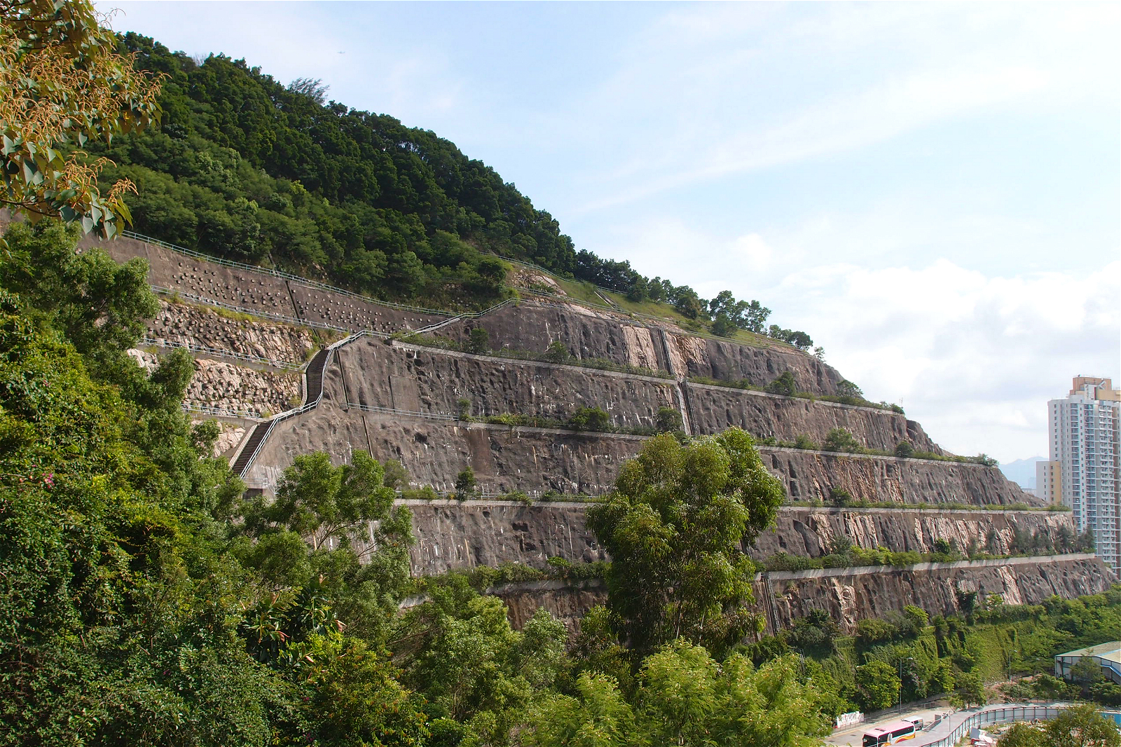 中文（香港）: 平山東南方出入口